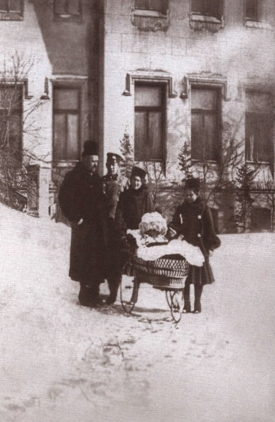 Савва Тимофеевич Морозов (1862-1905) с детьми Еленой, Марией, Тимофеем, Саввой.